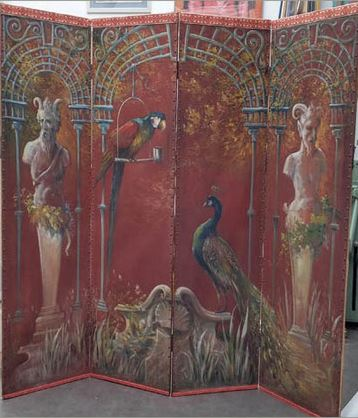 Représentation du décor d'un jardin italien orné d'un paon, d'un perroquet et de statues antiques, l'ensemble sous un feuillage d'automne.